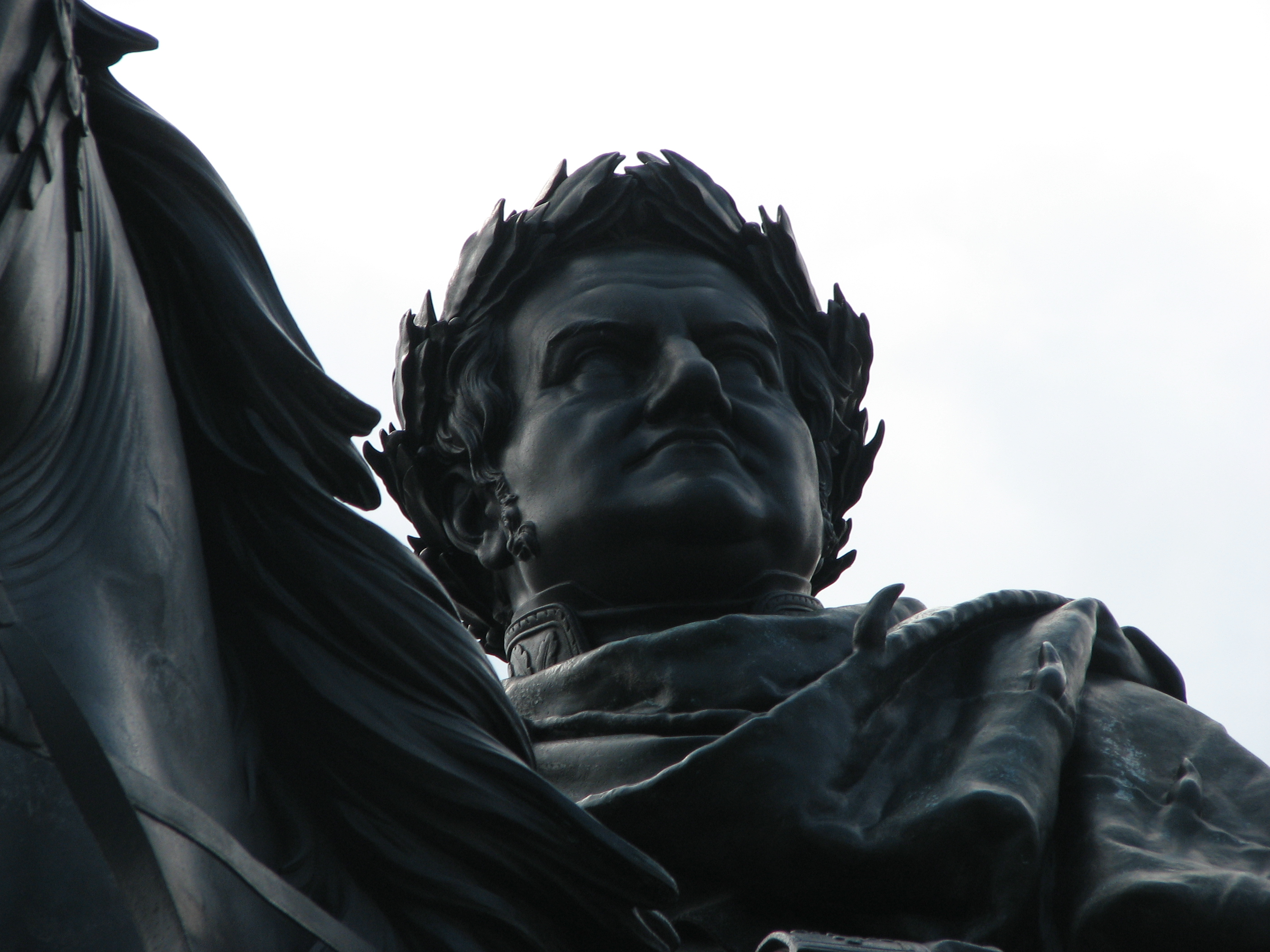 Großherzog Karl August von Sachsen-Weimar-Eisenach - Reiterstandbild in Weimar, von Adolf von Donndorf